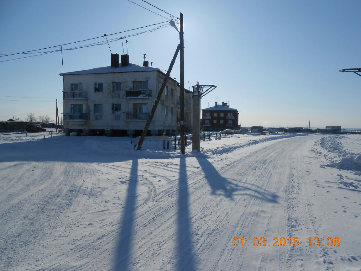 Кильдямцы